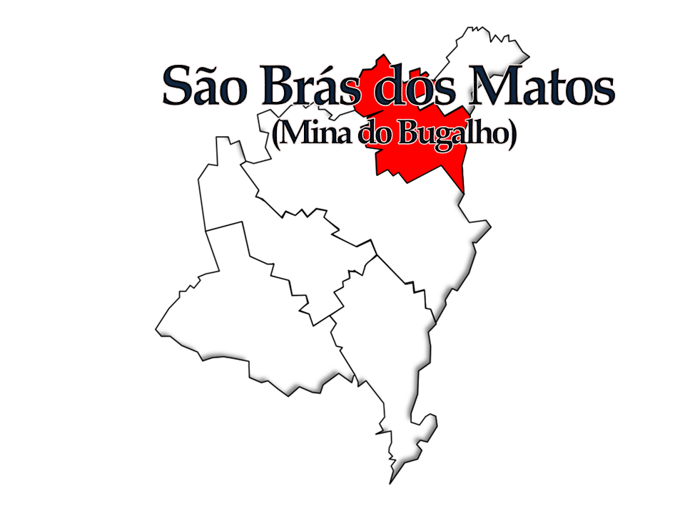 Censos 1864/2011